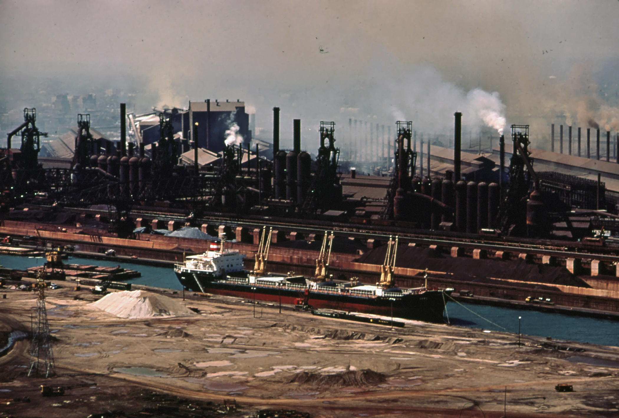 Republic-Steel-Werk in East Chicago, Indiana